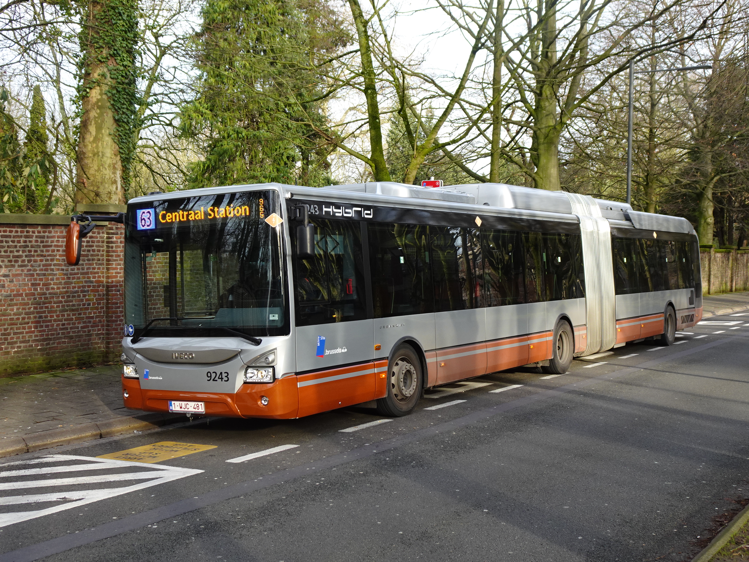 Nieuwe MIVB Iveco Urbanway 18 Hybrid, aan de terminus.